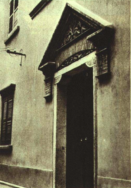 1921年至1923年中共书记处外景